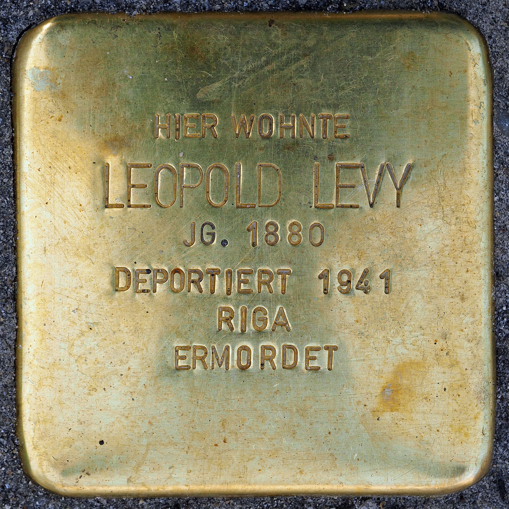 Stolpersteine Schwalmtal: Leopold Levy